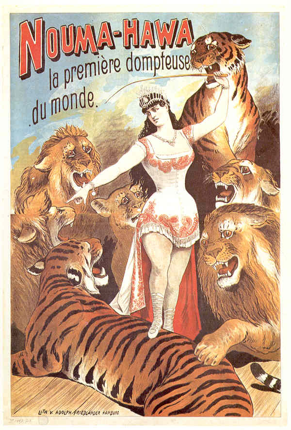 Nouma Hawa - La première dompteuse du monde. Farblithographie